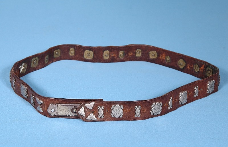 Қоңыр кемер белбеу.